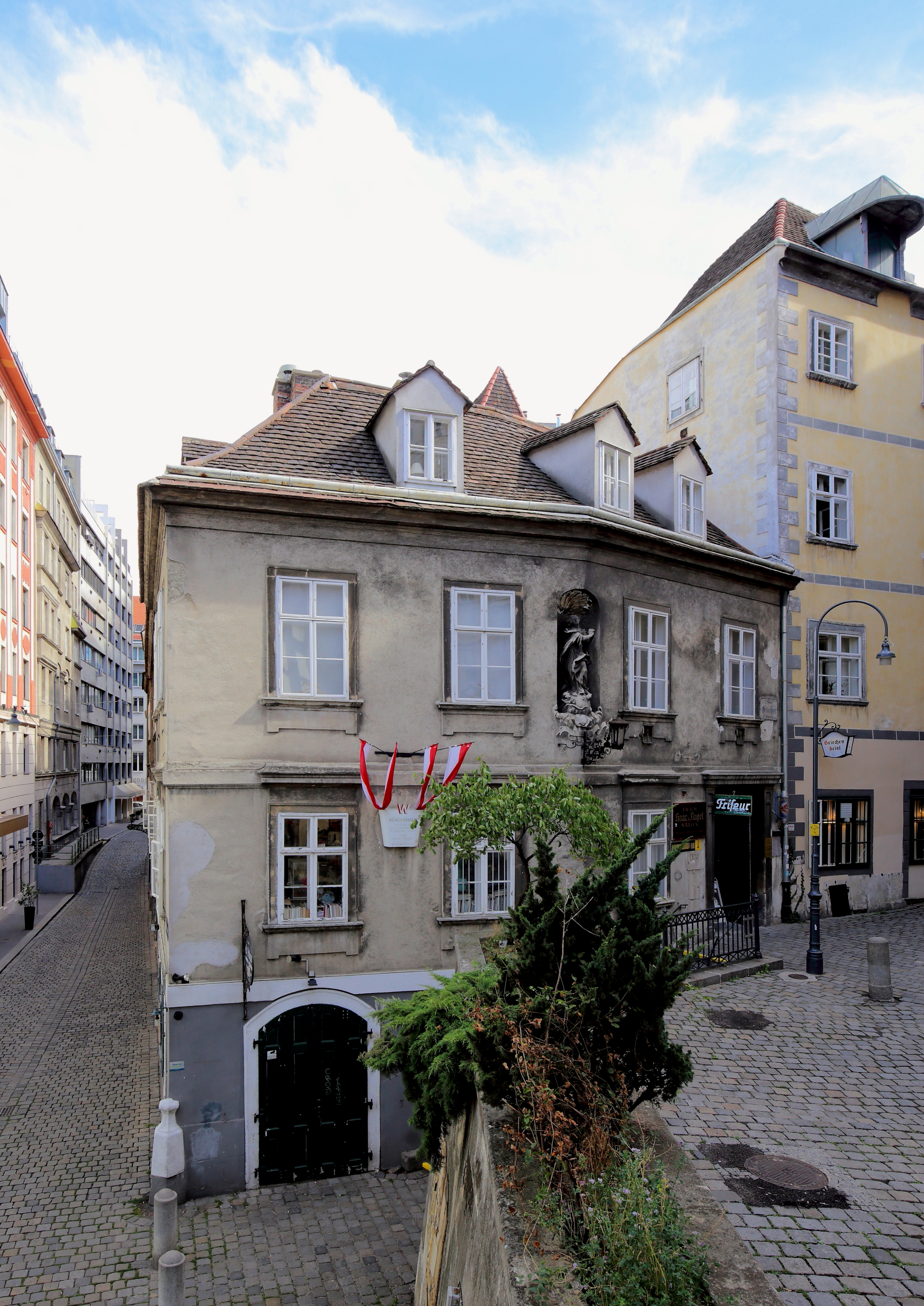 Ehemaliges Wirtshaus Zum gelben Adler an der Ecke Hafnersteig und Griechengasse im 1. Wiener Gemeindebezirk Innere Stadt.Das barocke Eckhaus aus dem 17. Jahrhundert erhielt in der zweiten Hälfte des 18. Jahrhunderts eine Neufassadierung und ist zum Hafnersteig hin dreigeschossig und zur Griechengasse zweigeschossig. Schräg über dem Portal in der Griechengasse befindet sich in einer Rundnische mit Muscheldekor eine Maria Immaculata-Skulptur und unterhalb der Nische eine Rokokolaterne.